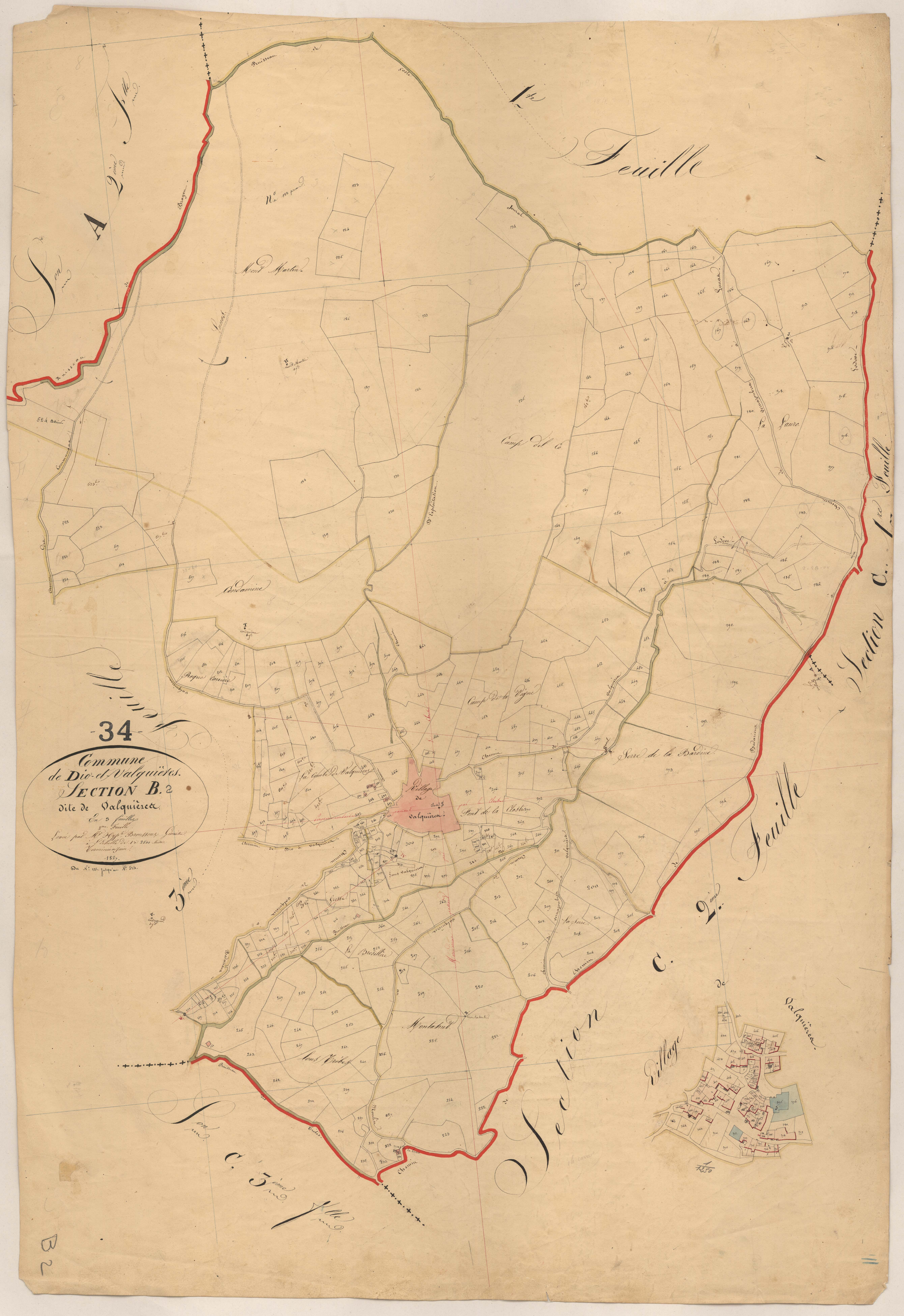 Dio-et-Valquières. - Cadastre napoléonien : plan de la section B2 de Valquières